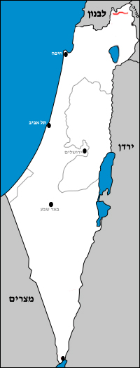 כביש 99 בין צומת המצודות במערבו לצומת מסעדה במזרחו.